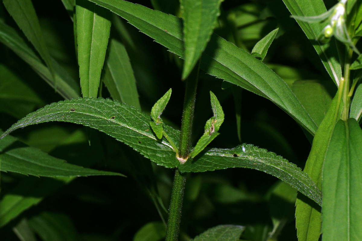 Močvirnati čišljak na ljubljanskem barju.